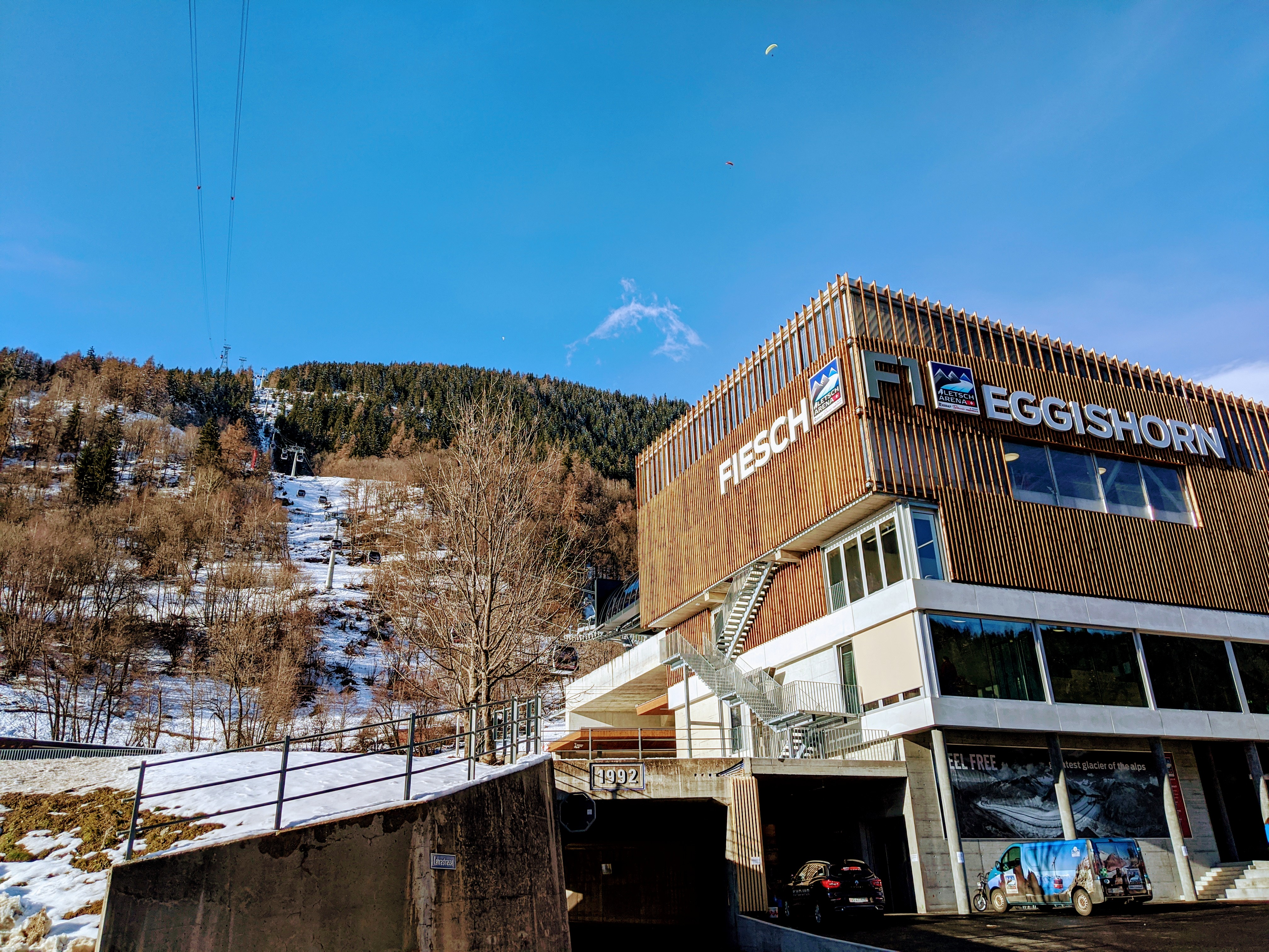 Fiesch Eggishorn Talstation